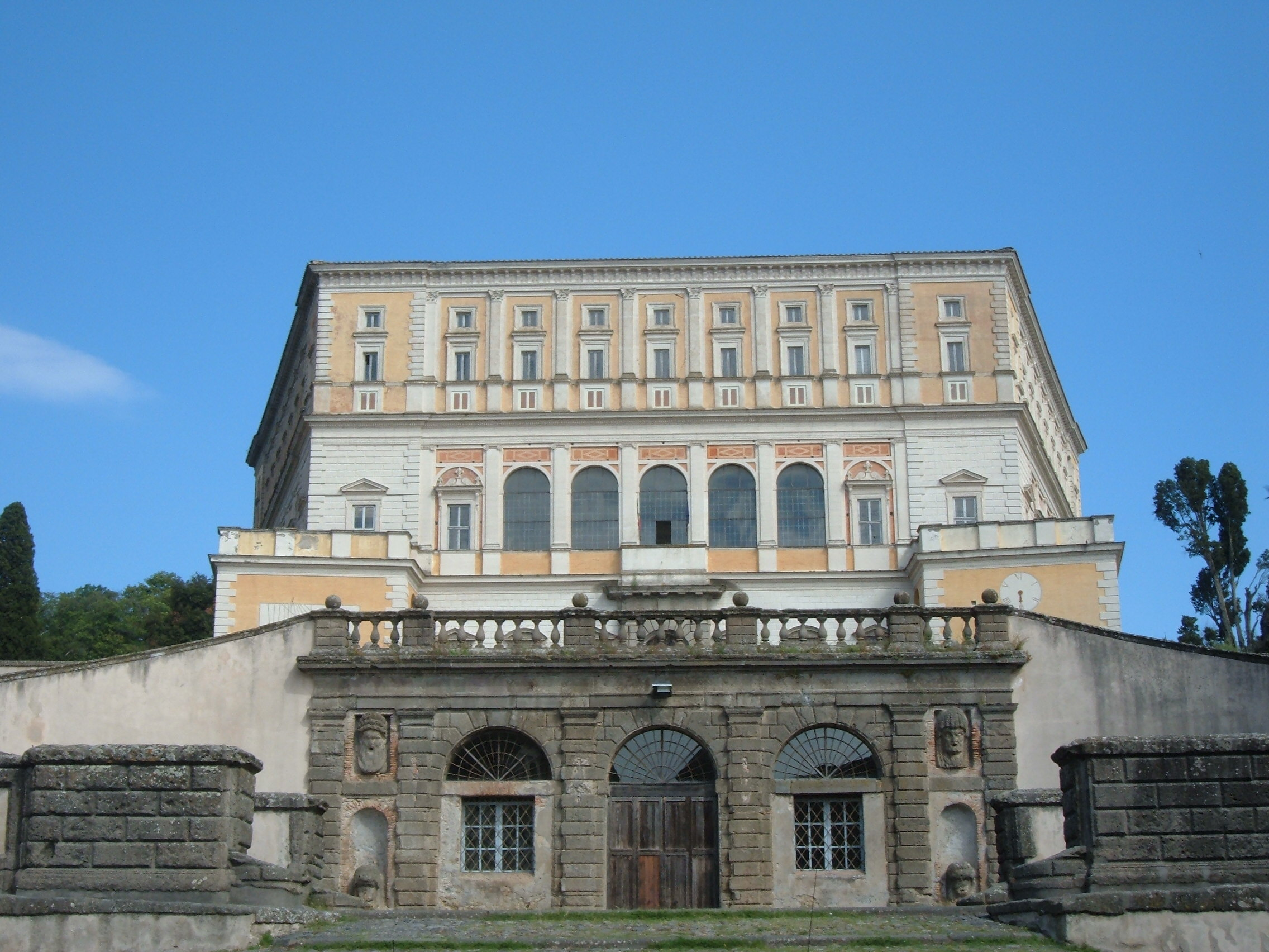 Palazzo Farnese a Caprarola (VT). Palazzo Farnese (Caprarola) Native namePalazzo Farnese (Caprarola)LocationCaprarola, Lazio, ItalyCoordinates42° 19′ 44″ N, 12° 14′ 12″ E Established1550s (Constructed)